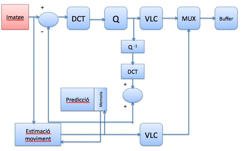 Codec_hibrido.png